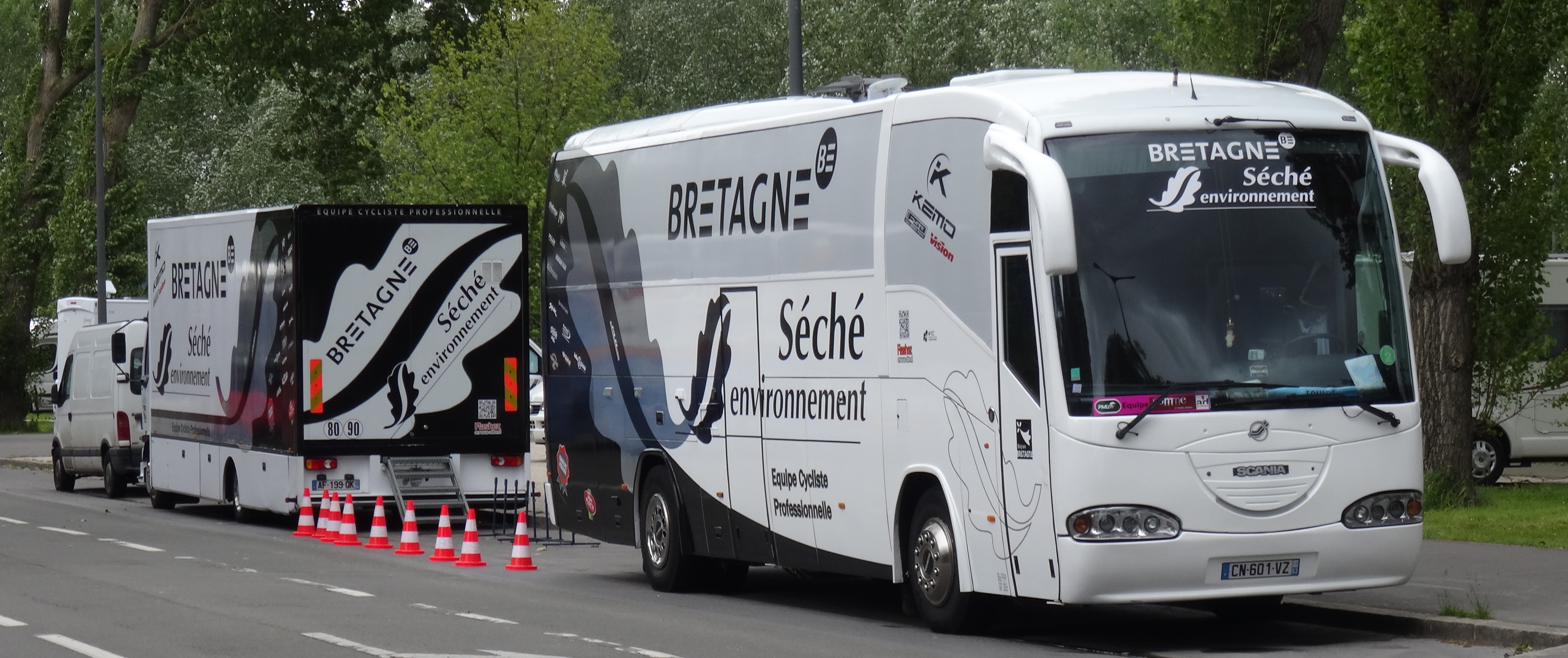 Reportage photographique réalisé le dimanche 11 mai 2014 à l'arrivée de la cinquième et dernière étape de l'édition 2014 des Quatre jours de Dunkerque à Dunkerque, Nord, Nord-Pas-de-Calais, France. Depicted team: Bretagne-Séché Environnement